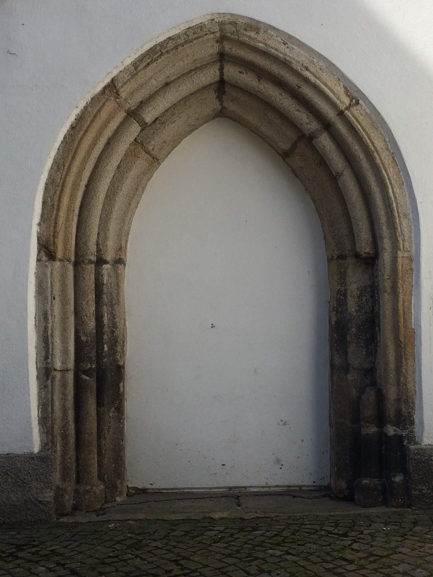 Raně gotický lomený portál byl odkryt v letech 1946-1947. Spolu se severní zdí je nejstarší částí kostela, asi z druhé poloviny 13.století.